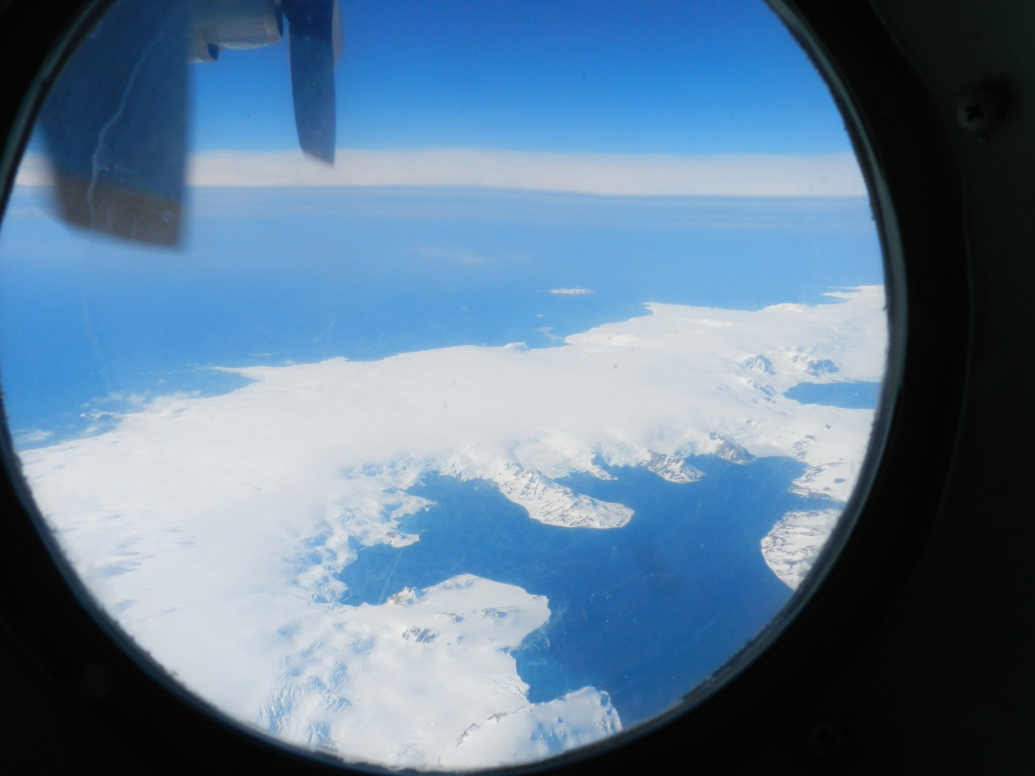 ingreso aereo en un C-130 de la Fach, con dos horas y treinta minutos de viaje desde P. Arenas a Base Frei.